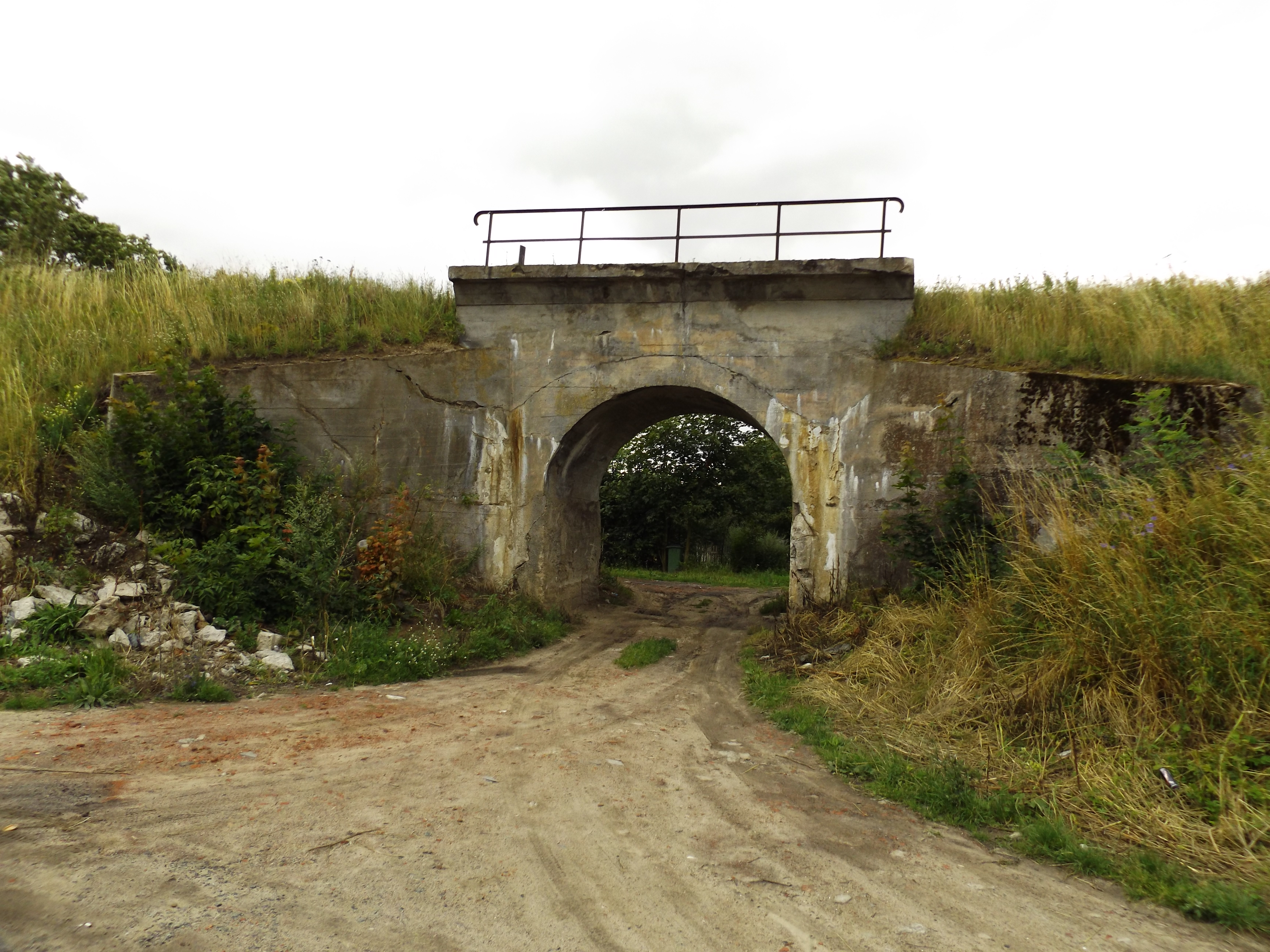 Wiadukt kolejki wąskotorowej, okolice Śluzy Przegalina w Gdańsku.